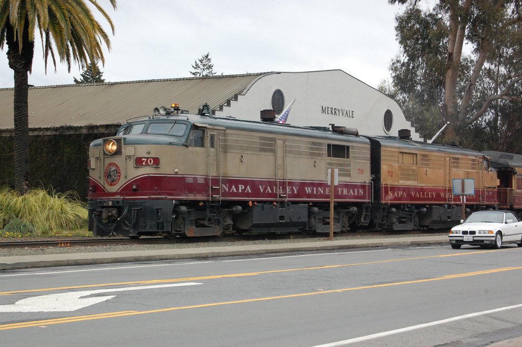 Napa Valley Wine Train Diesel locomotive #70 Alco MLW/FPA-4